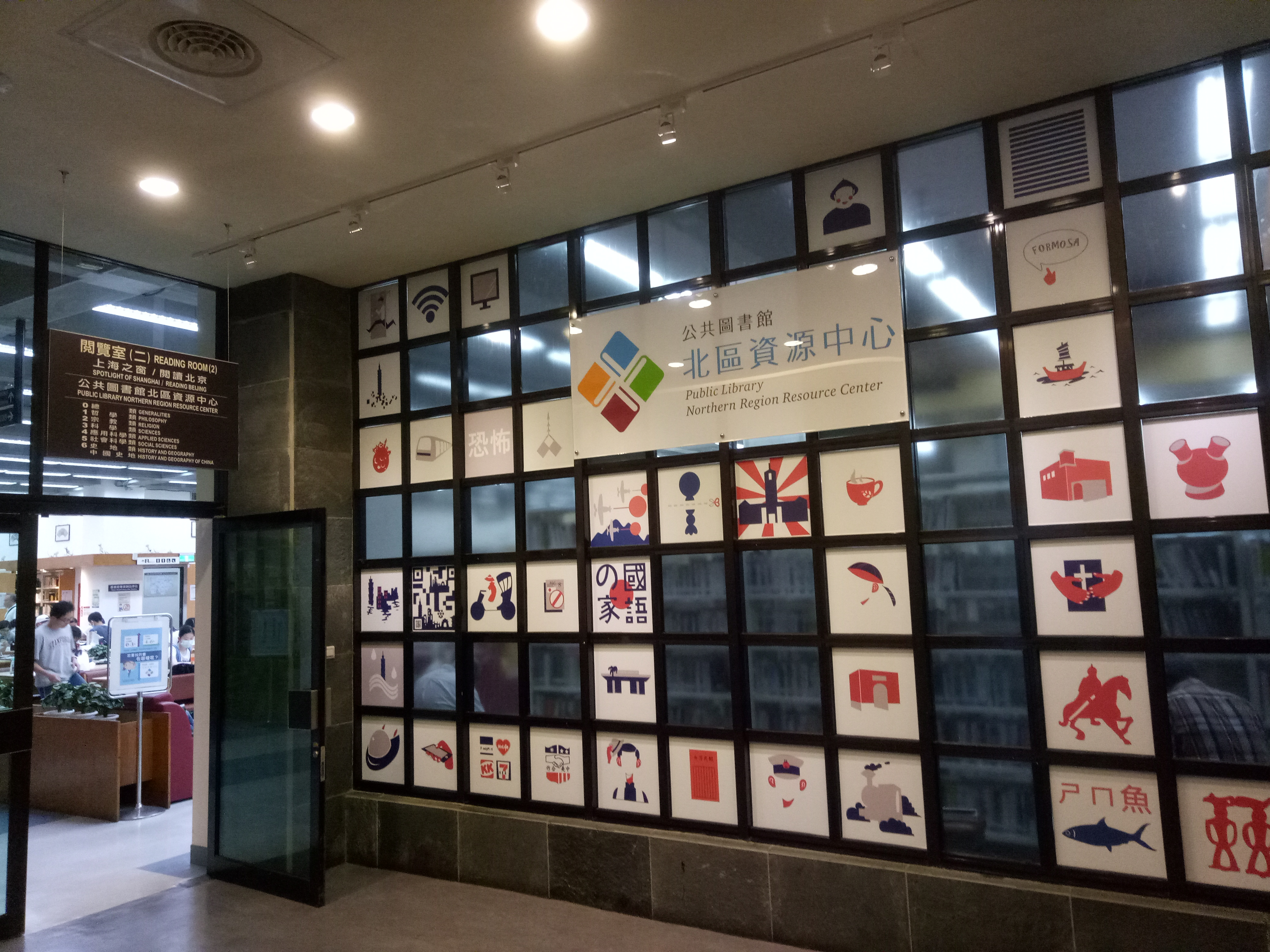 臺北市立圖書館總館 北區資源中心